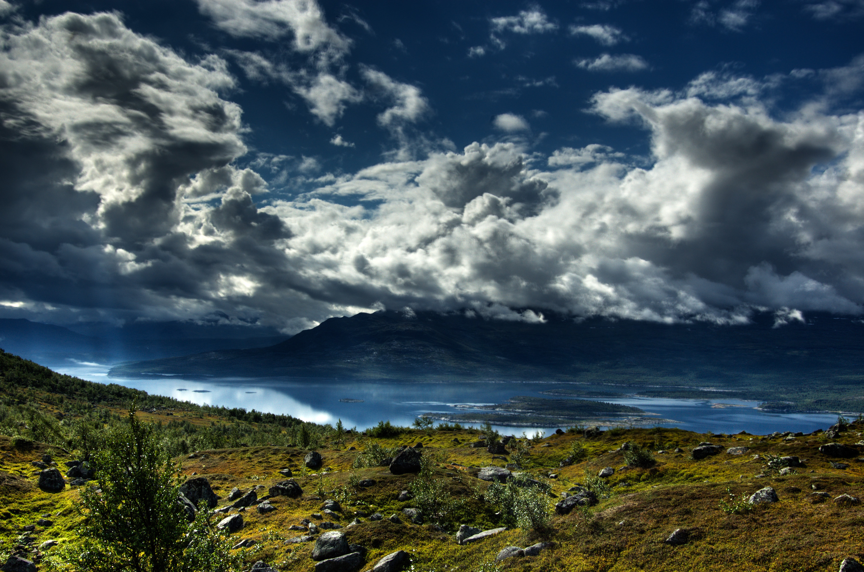 Suorvajaure from Vakkotavare, in Stora Sjöfallet Park, northern Sweden.